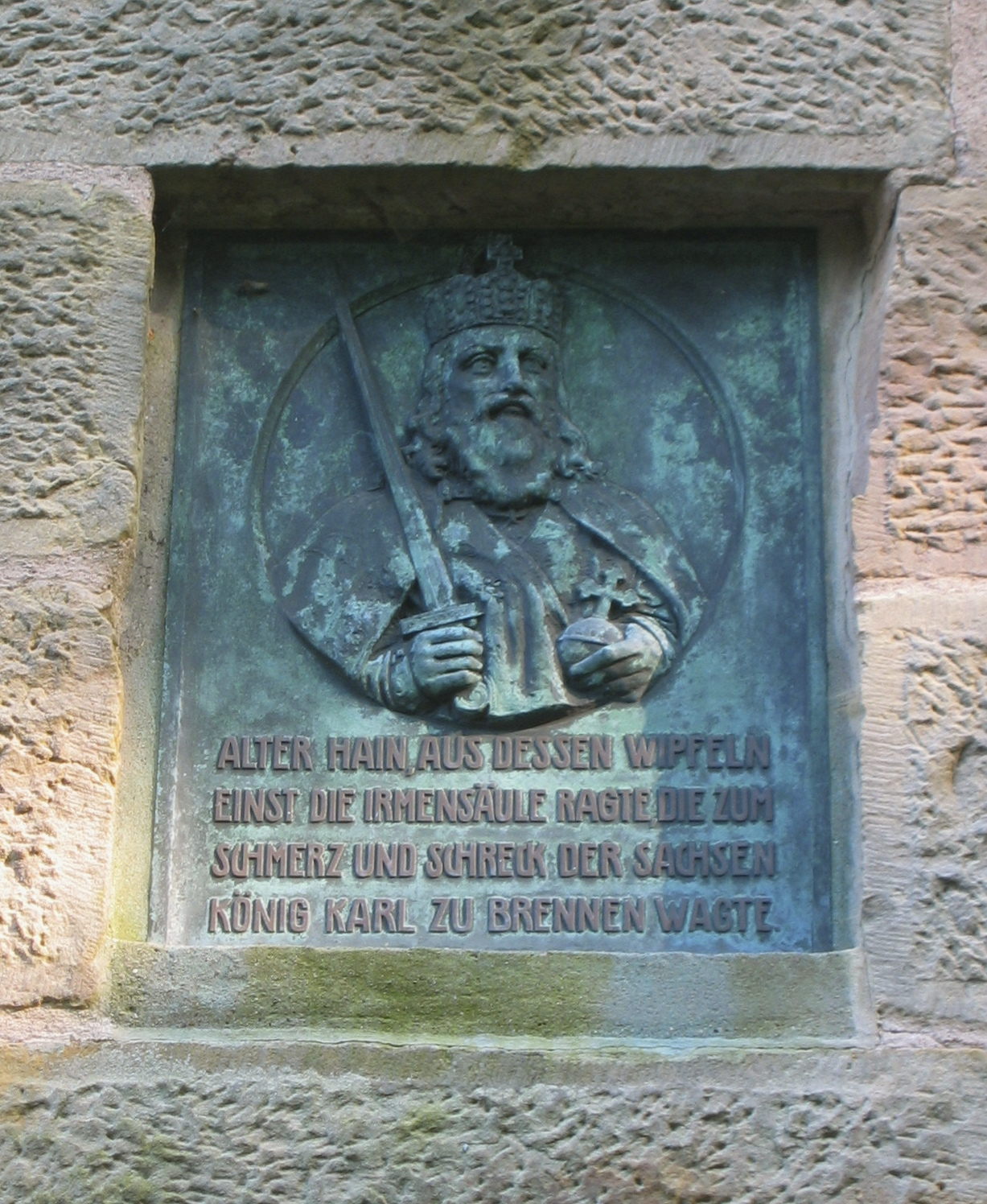 Bronzetafel über dem Eingang vom 1904 errichteten Kaiser-Karls-Turm in Bad Driburg mit einem Zitat aus Friedrich Wilhelm Webers „Dreizehnlinden“: „Alter Hain, aus dessen Wipfeln einst die Irmensäule ragte, die zum Schmerz und Schreck der Sachsen König Karl zu brennen wagte.“